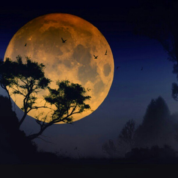 via Instagram instagr.am/p/PCKR4MH2xu/